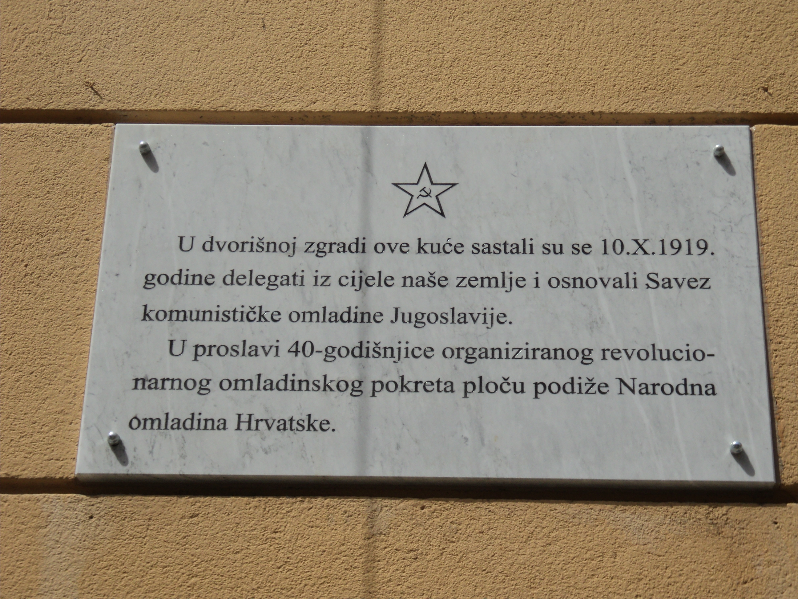 Spomen-ploča na zgradi u kojoj je 1919. godine u Zagrebu osnovan SKOJ.